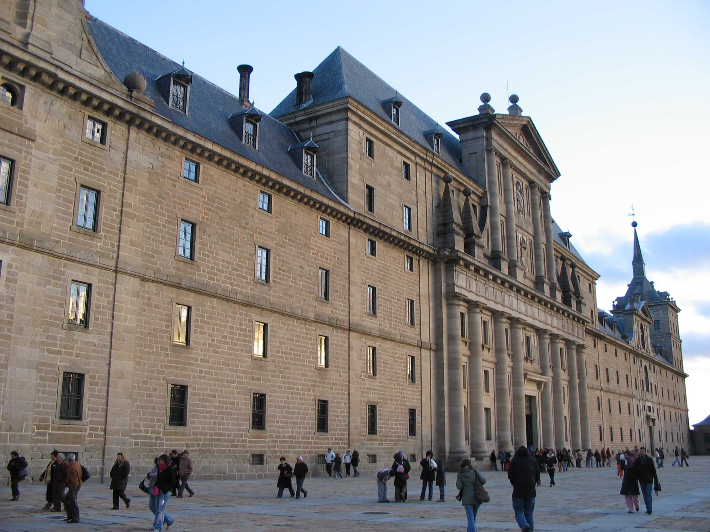 Monasterio de San Lorenzo de El Escorial. Fachada de acceso principal.